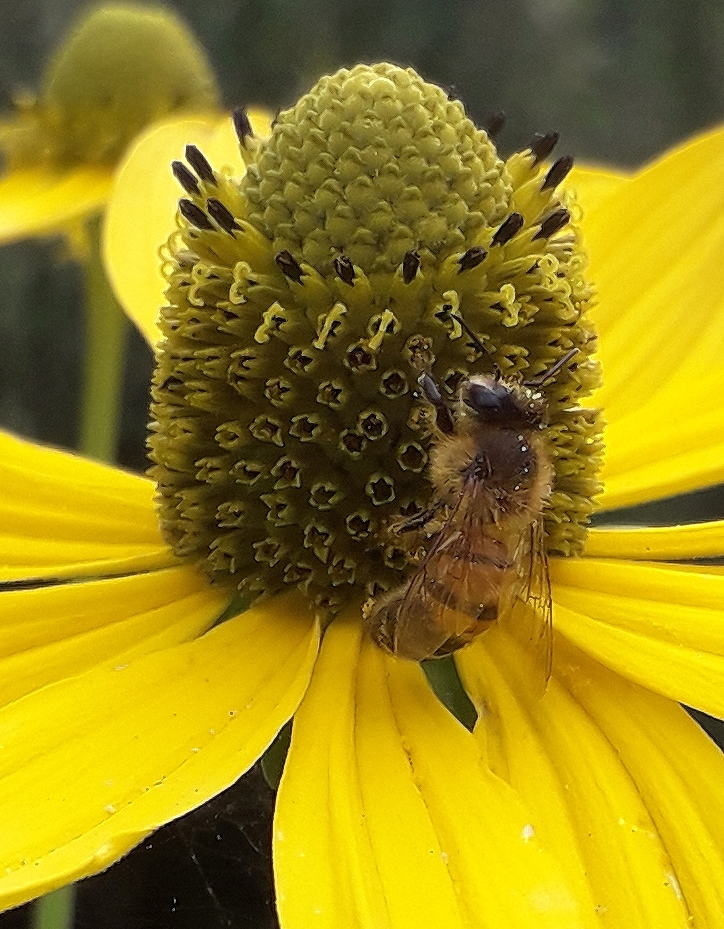 Echte Rödertalblume, Rudbeckia laciniata, Grüne Röhrenblüte, 3